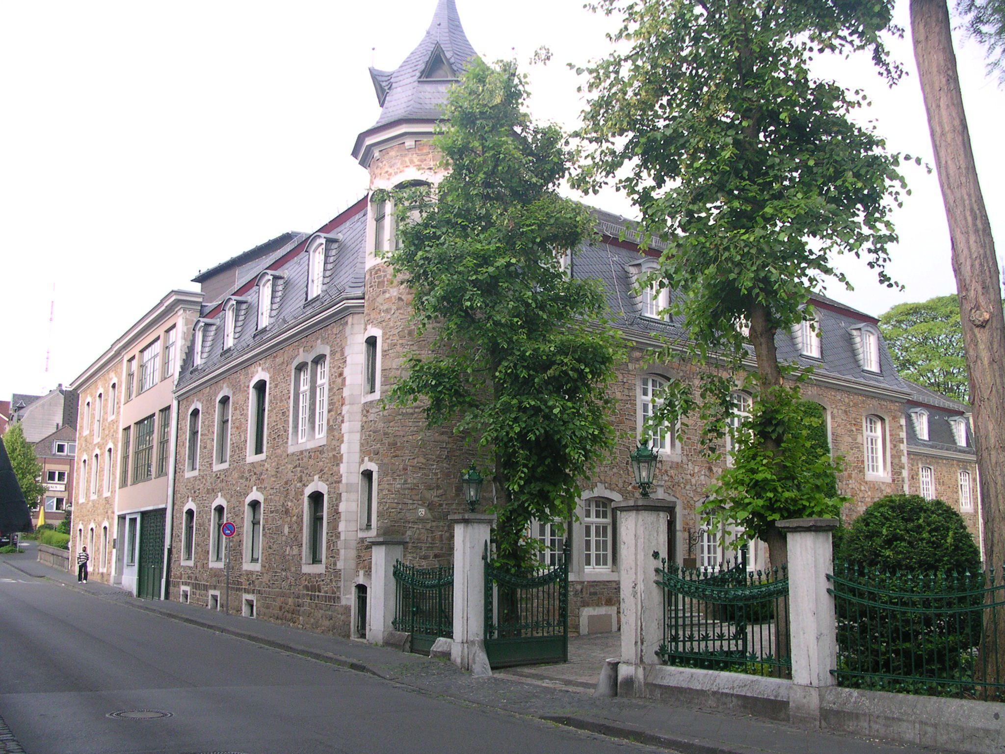 Stolberg, Stammhaus der Grünenthal GmbH